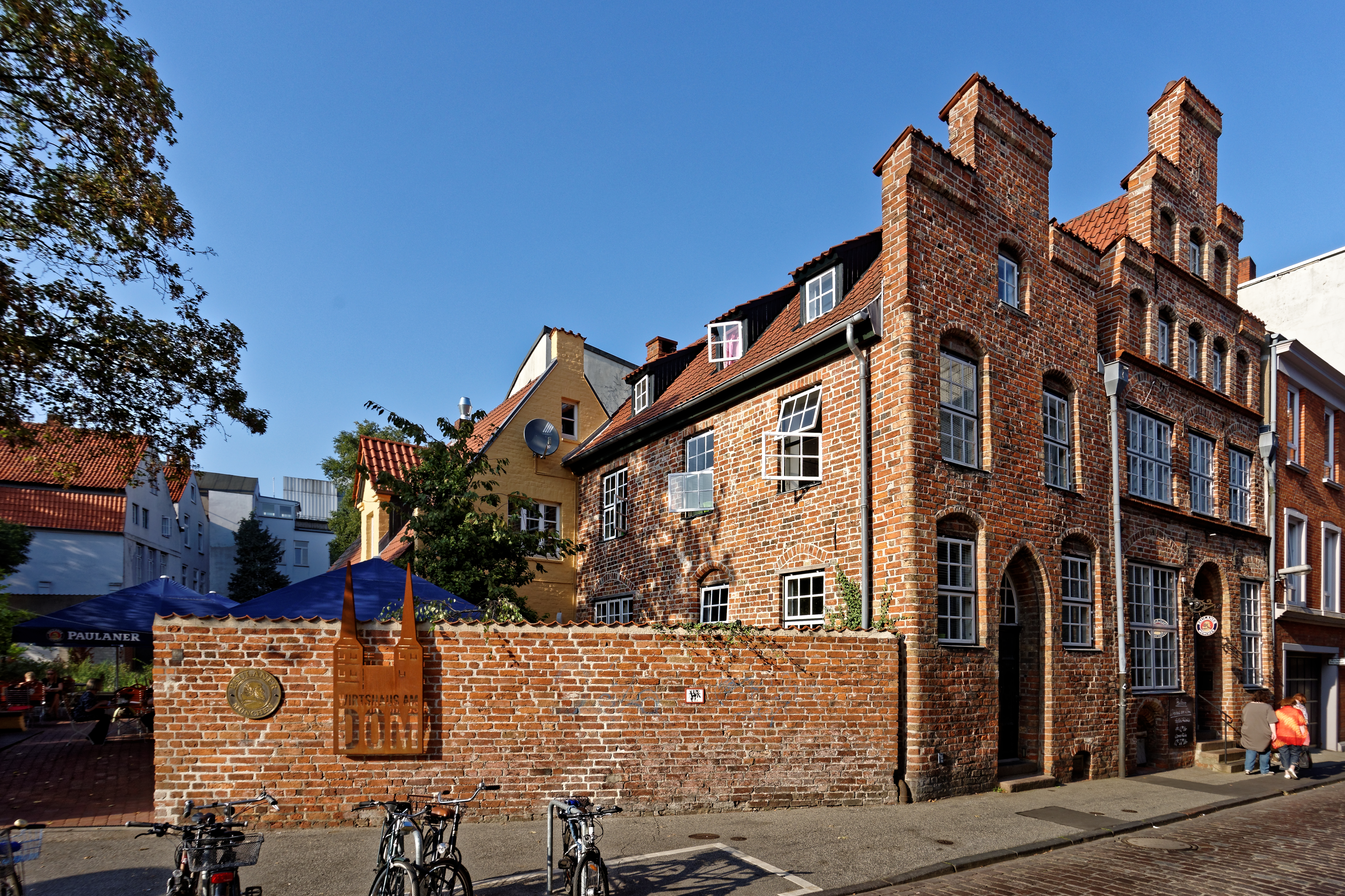 Lübecker Altstadt, Kapitelstraße 4–6